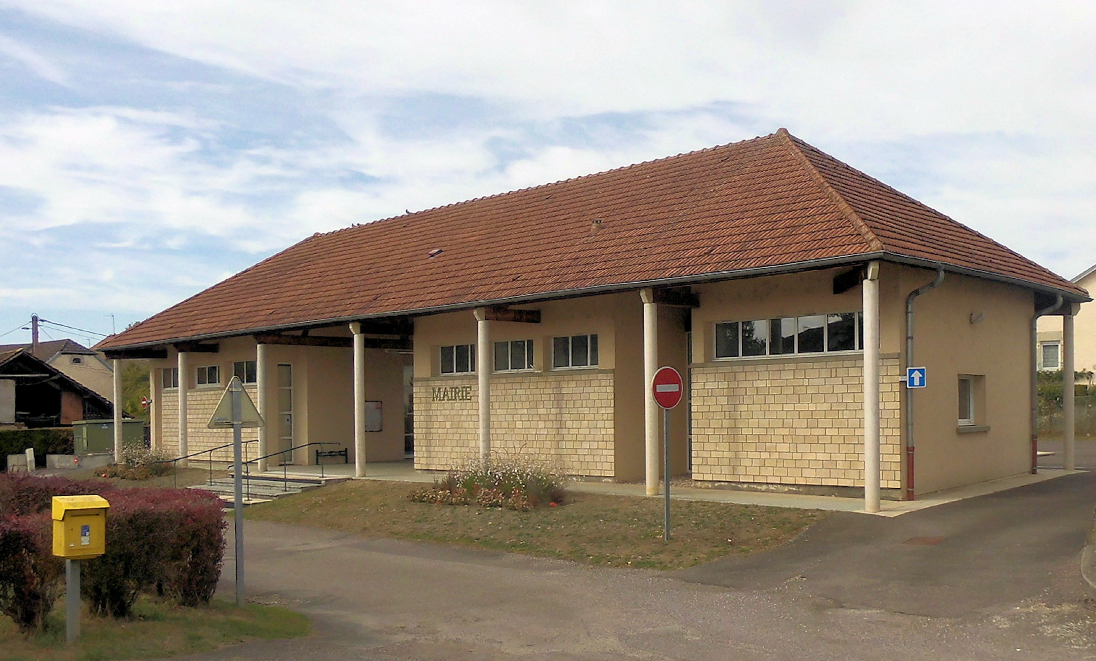 La mairie d'Auxon